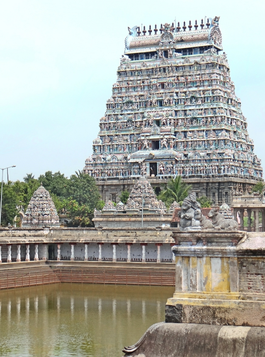 Le Shivaganga : bassin sacré entouré d'une colonnade ; au fond, le gopuram nord (Shivaganga Tank) Le temple de Shiva Nataraja dans sa forme actuelle date principalement des 12e et 13e siècles, avec des ajouts ultérieurs dans le style dravidien. C'est l'un des lieux saints du Shivaïsme. Il est dédié au Shiva Nataraja (Shiva dansant). Il est en plein coeur de la cité de Chidambaram. Les danses de Shiva sont au nombre de sept (avec 108 poses combinées). Celle dansée par Shiva à Chidambaram est la plus connue, c'est "l'ânada-tândavam". Elle est exécutée sur le terrain d'incinération, celui-ci symbolise le coeur des hommes, le feu détruisant notre ego, c'est à dire les illusions. La danse permet d'atteindre la libération. Le temple comprend 4 enceintes et 9 entrées (autant que le corps humain). Certaines entrées sont surmontées de Gopuram(s) de 7 étages. A l'intérieur du temple, se trouvent la Cella contenant la statue de Shiva Nataraja, plusieurs sanctuaires (Shivakamasundari, Subramanya/Murugan...) , un vaste bassin sacré, entouré d'une colonnade et des salles pour accueillir les fidèles dont une salle aux mille piliers (Raja Sabha). Site du temple du Shiva Nataraja Article de Wikipedia sur le temple